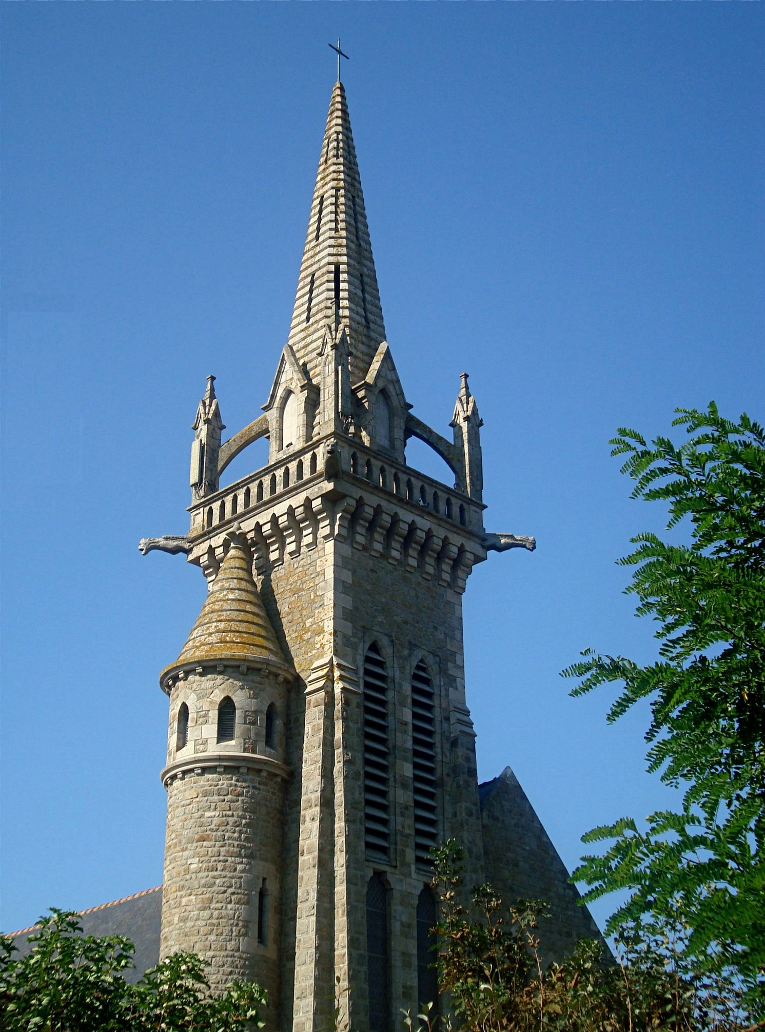 Eglise Notre Dame (1931-1932), Saint Jacut-de-la-Mer, Côtes-d'Armor, France